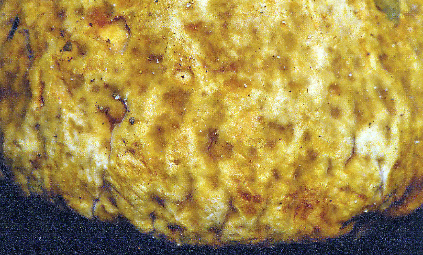 Boletus depiltus 1986 Lisle Adam France det. Redeuilh, Romagnesi et Delaporte